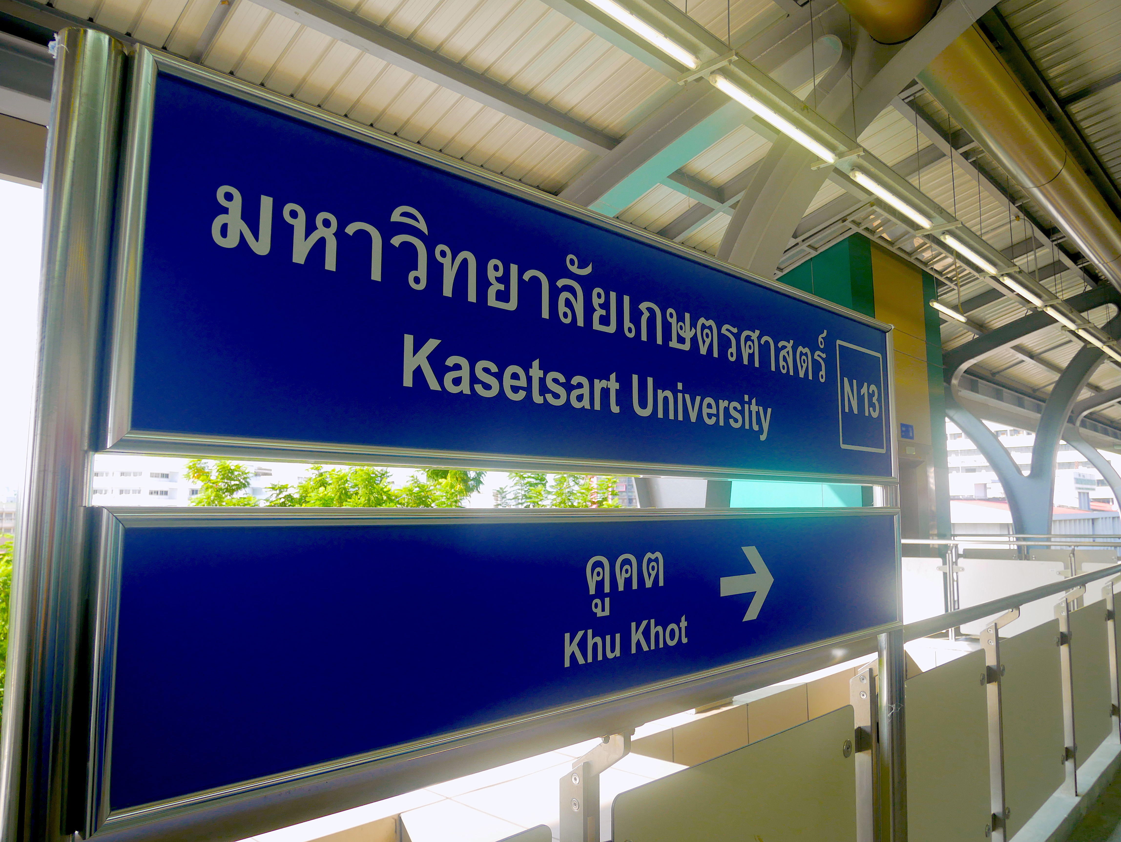 ป้ายสถานีมหาวิทยาลัยเกษตรศาสตร์ ชานชาลาฝั่งไปคูคต